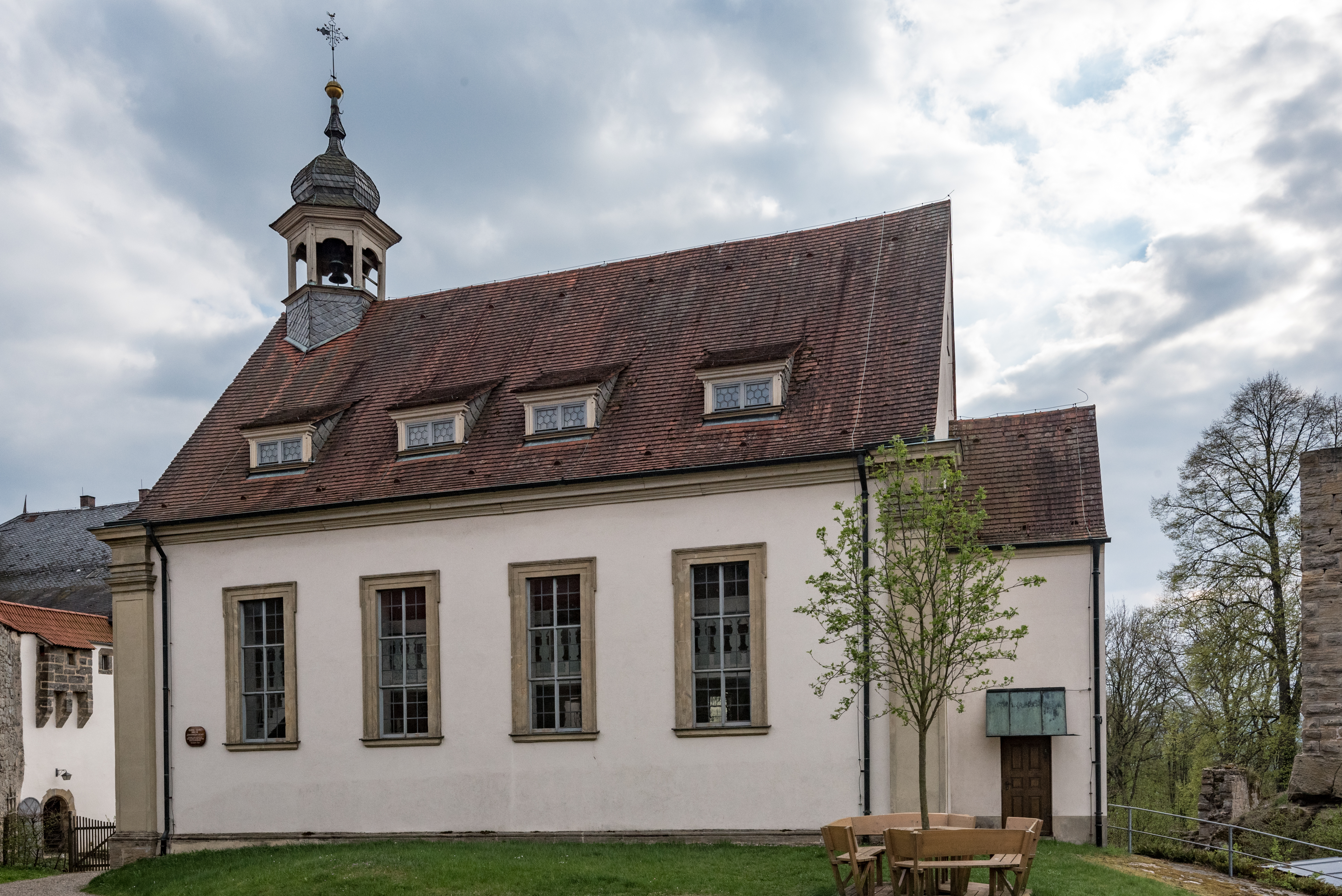 Pfarrweisach, Liechtenstein, Pfarrkirche